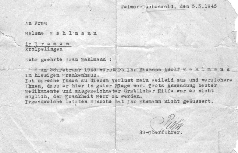 Mitteilng der SS vom 5.3.1945 über den Tod von Adolf Mahlmann